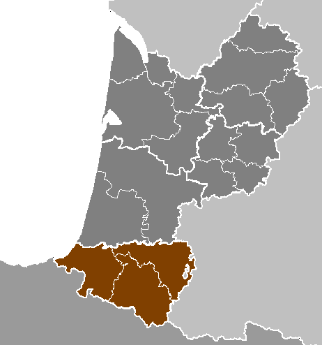 Maps of arrondissements and cantons of France: Département des Pyrénées-Atlantiques.PNG (Région Aquitaine)